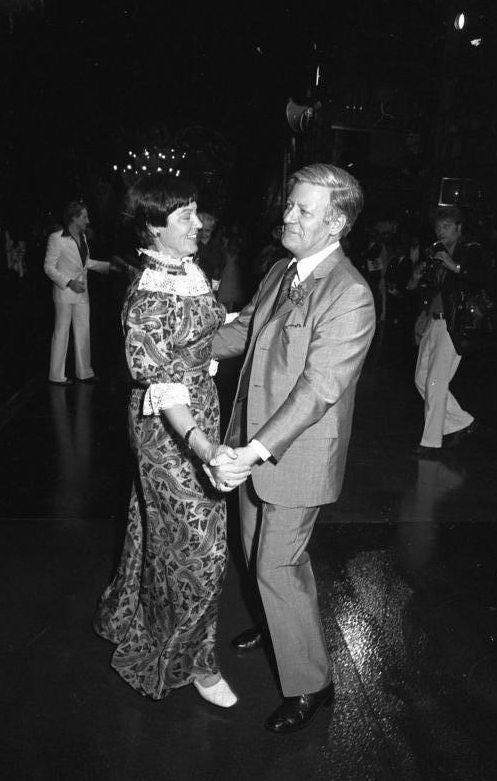 1.07.1977 Kanzlerfest Information added by Wikimedia users.Die Veranstaltung fand als Sommerfest unter dem Motto "Hat die Welt Töne!" im Theater der Stadt Bonn (heute Oper Bonn), Am Boeselagerhof 1 statt.